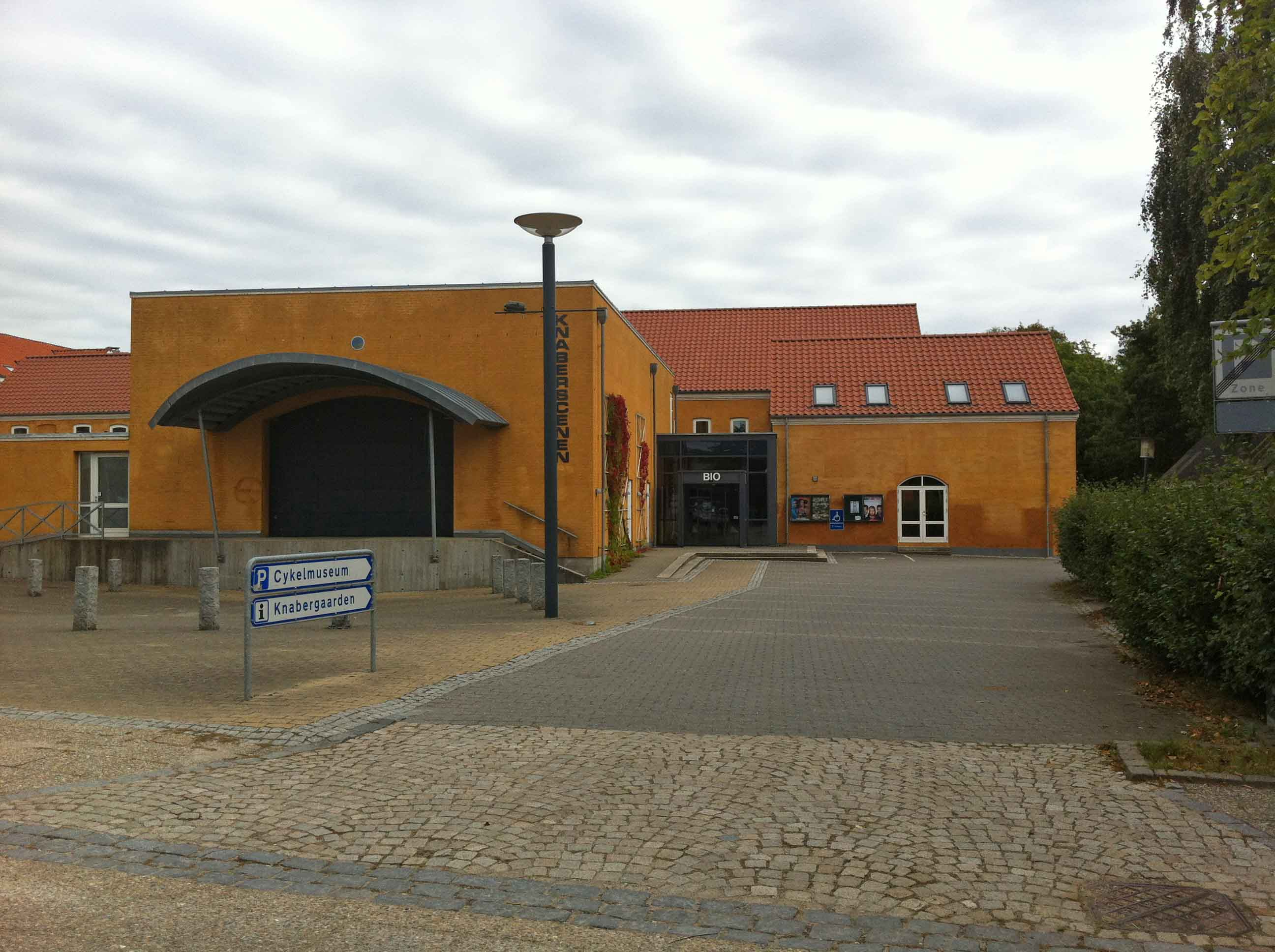 Knaberscenen og biografen i Aalestrup